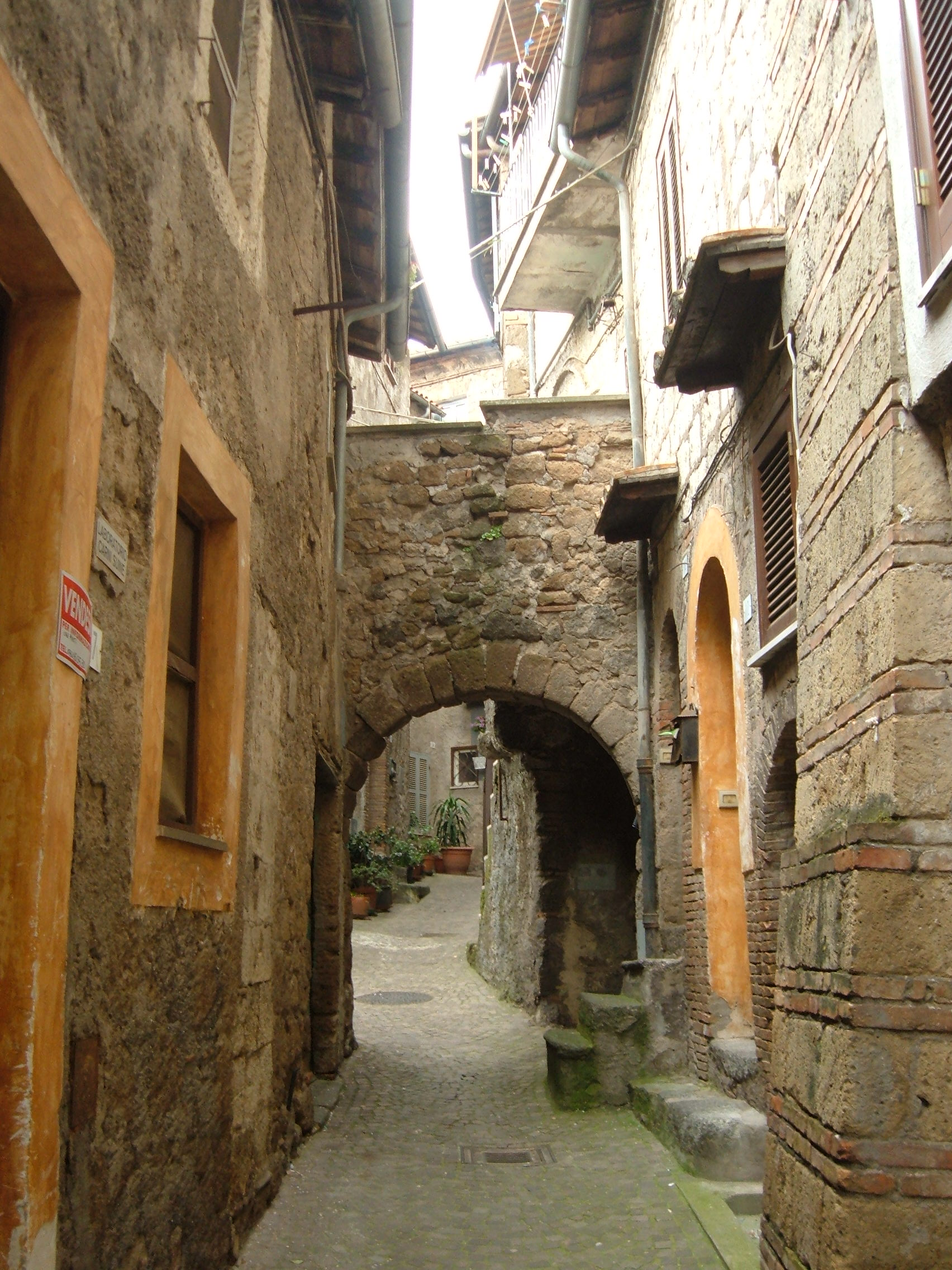 Camminando in Carbognano...